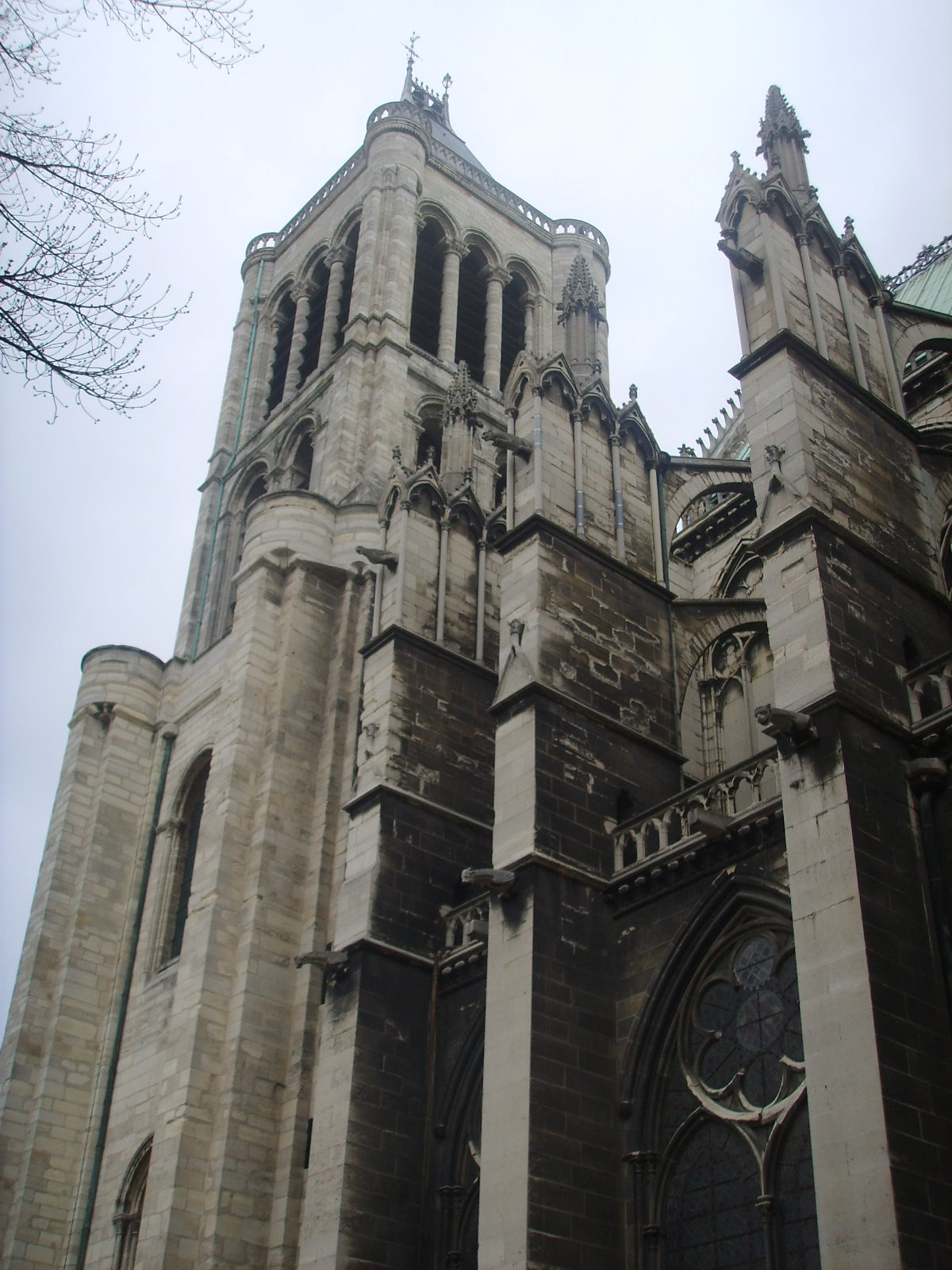 Basilica_di_saint_Denis esterno Paris